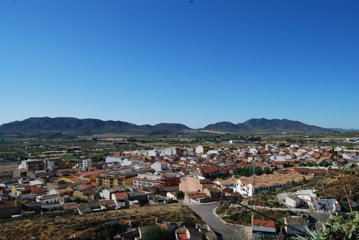 Vista de la Sierra de Enmedio desde el Castillo de Nogalte